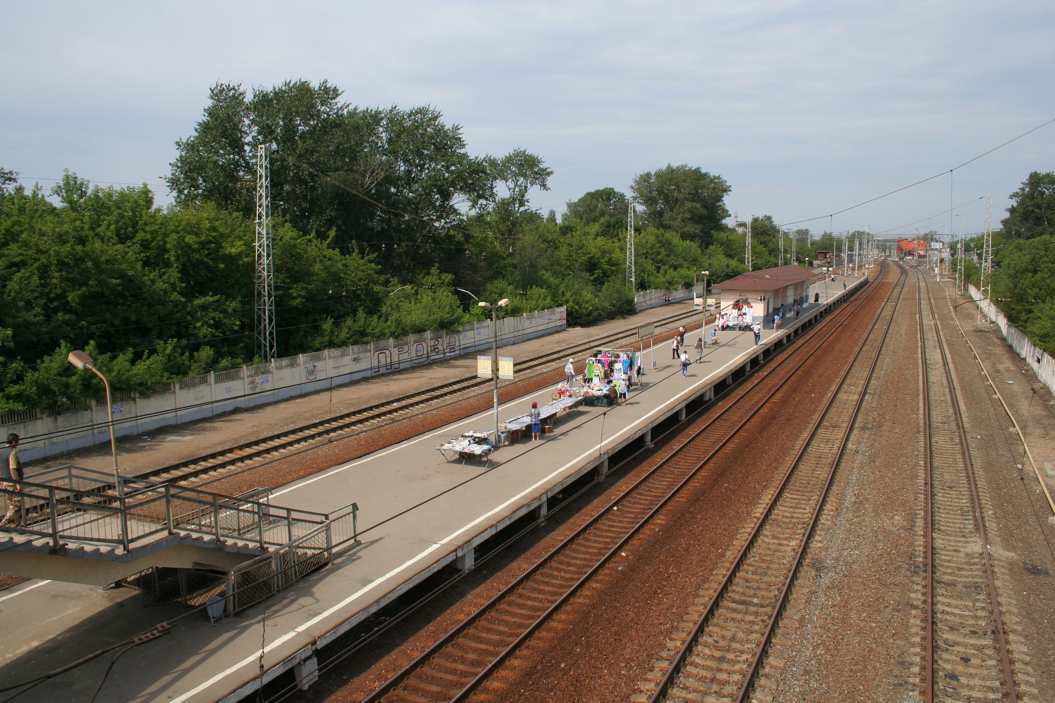 Vorortzug-Haltepunkt in Elektrougli, Oblast Moskau, Russland.